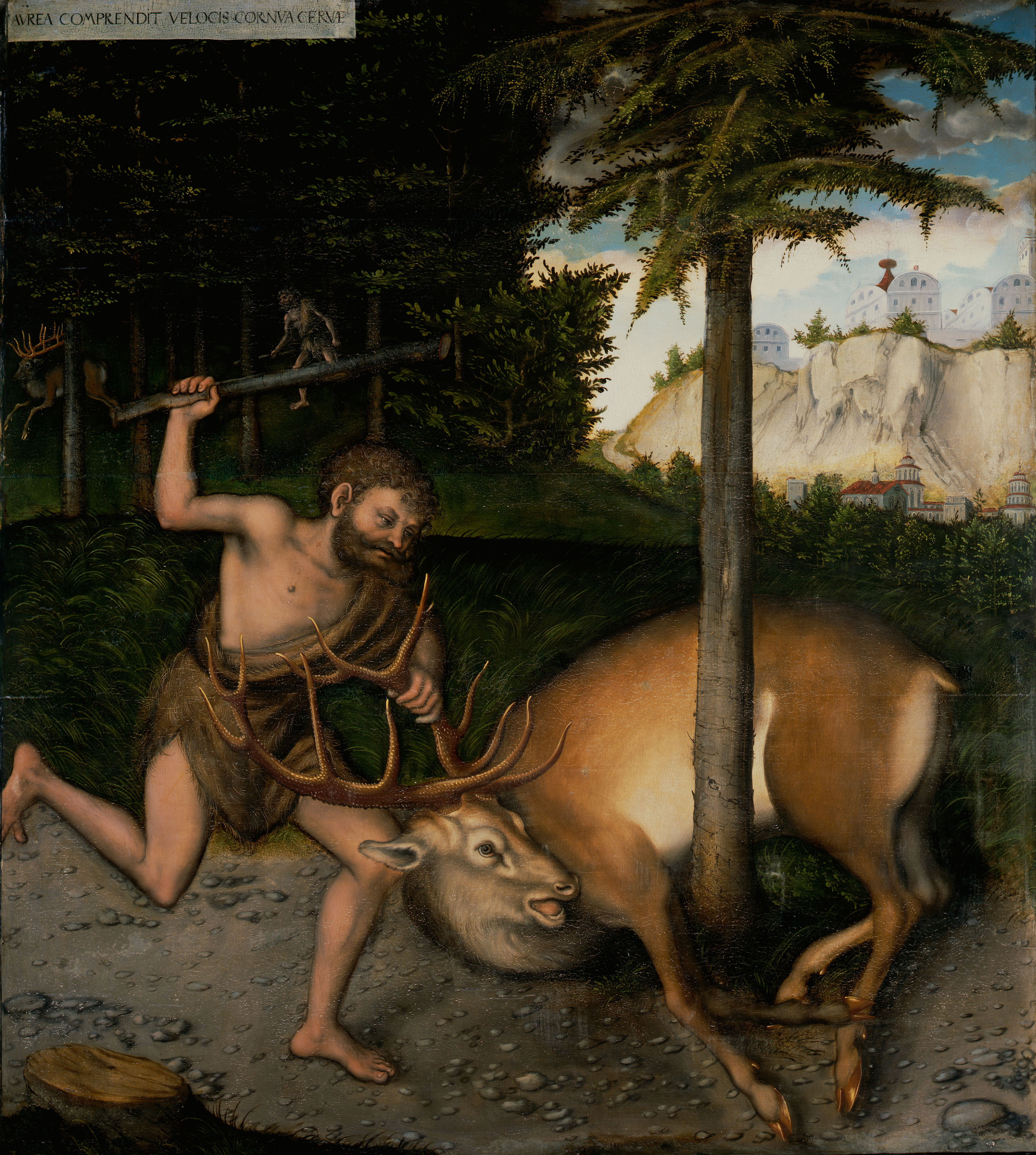 Bildfolge zur Herkules-Legende